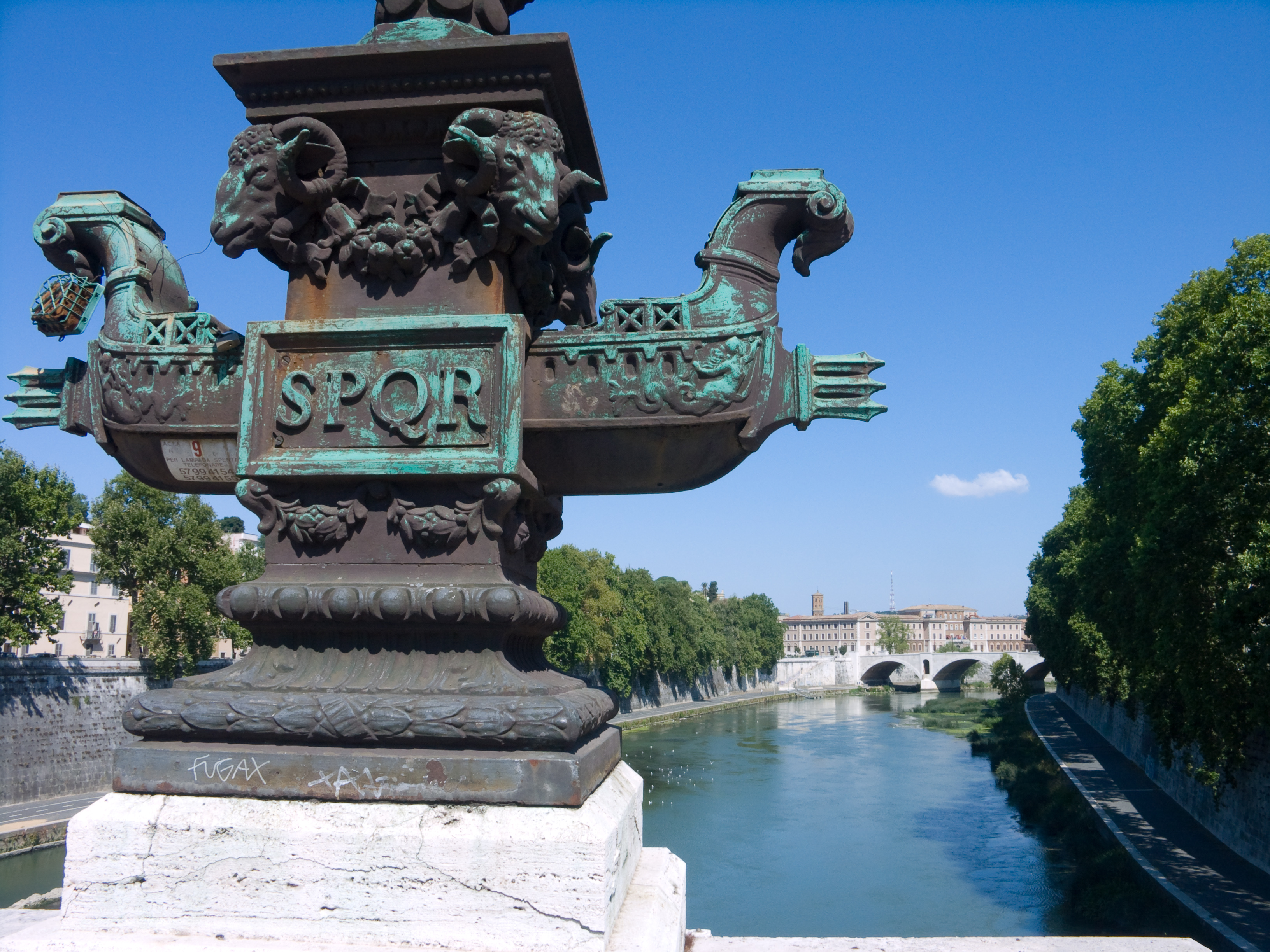 Rostra (ou rostres, proues avec éperons navals) sur le Ponte Mazzini, le Tibre, le Ponte Principe Amadeo Savoia Aosta et l'ospedale Santo Spirito à Rome, Italie.